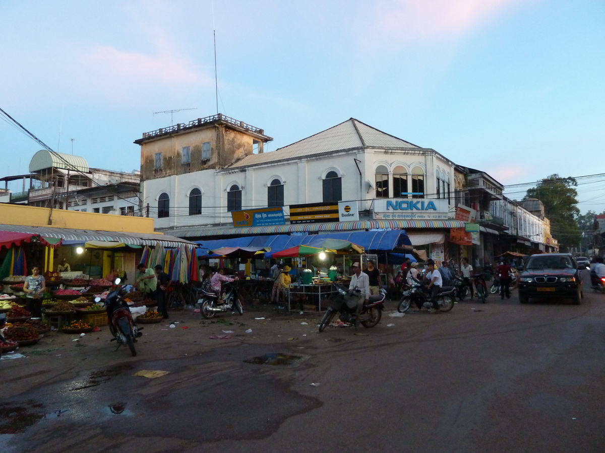 Market in Kratie